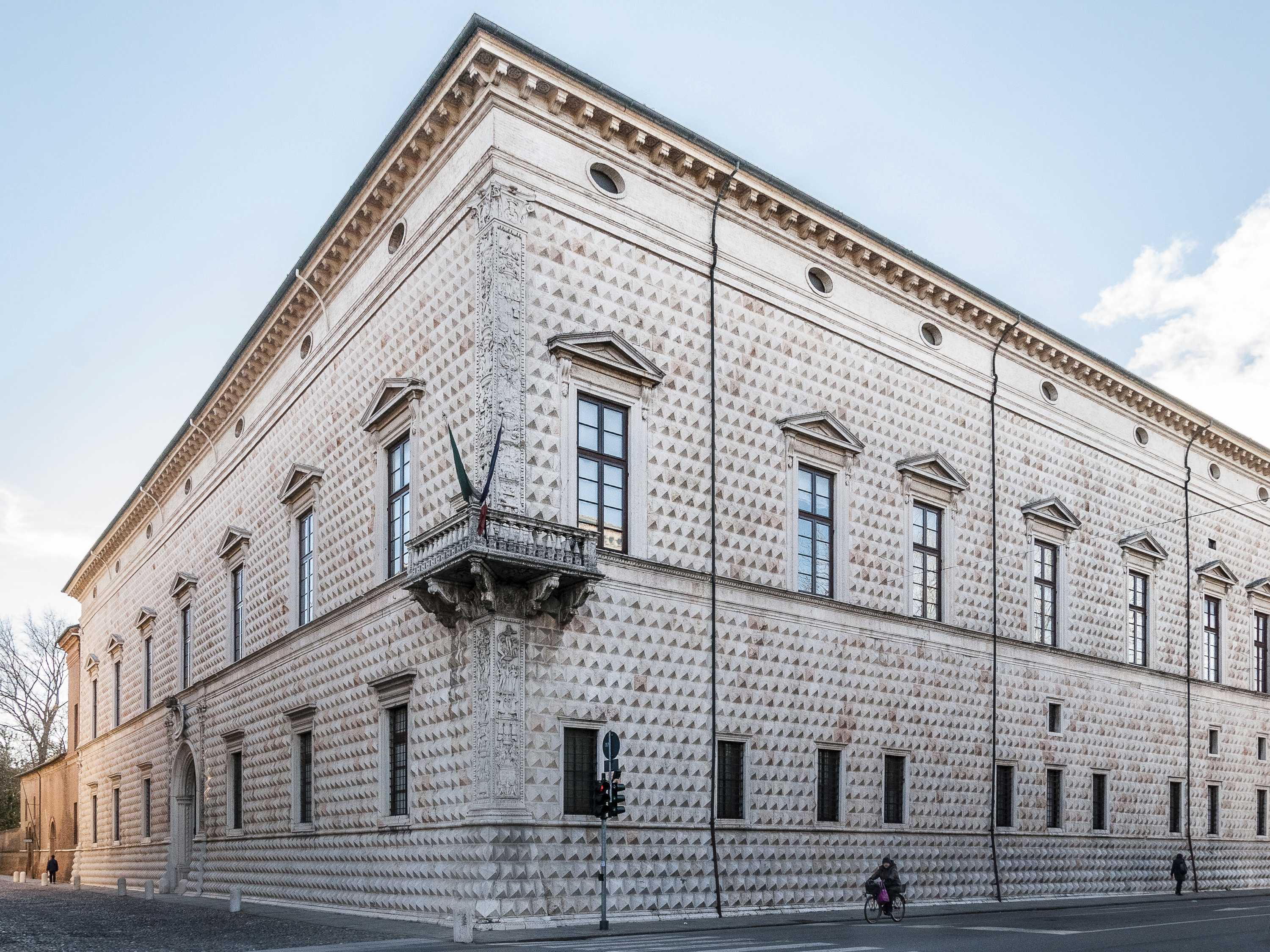 Palazzo dei Diamanti This is a photo of a monument which is part of cultural heritage of Italy.